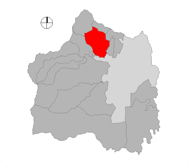 Corregimiento de Cali, Colombia